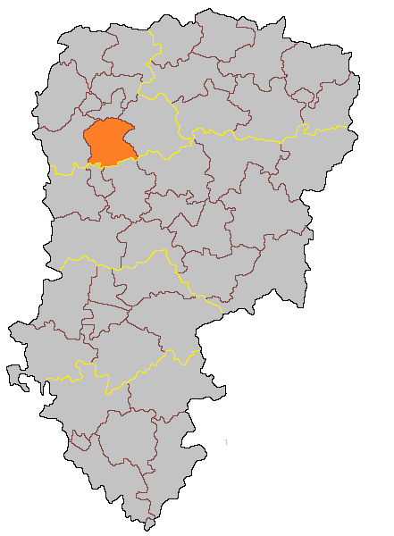 Кантон Мои-де-л’Эн на карте департамента Эна